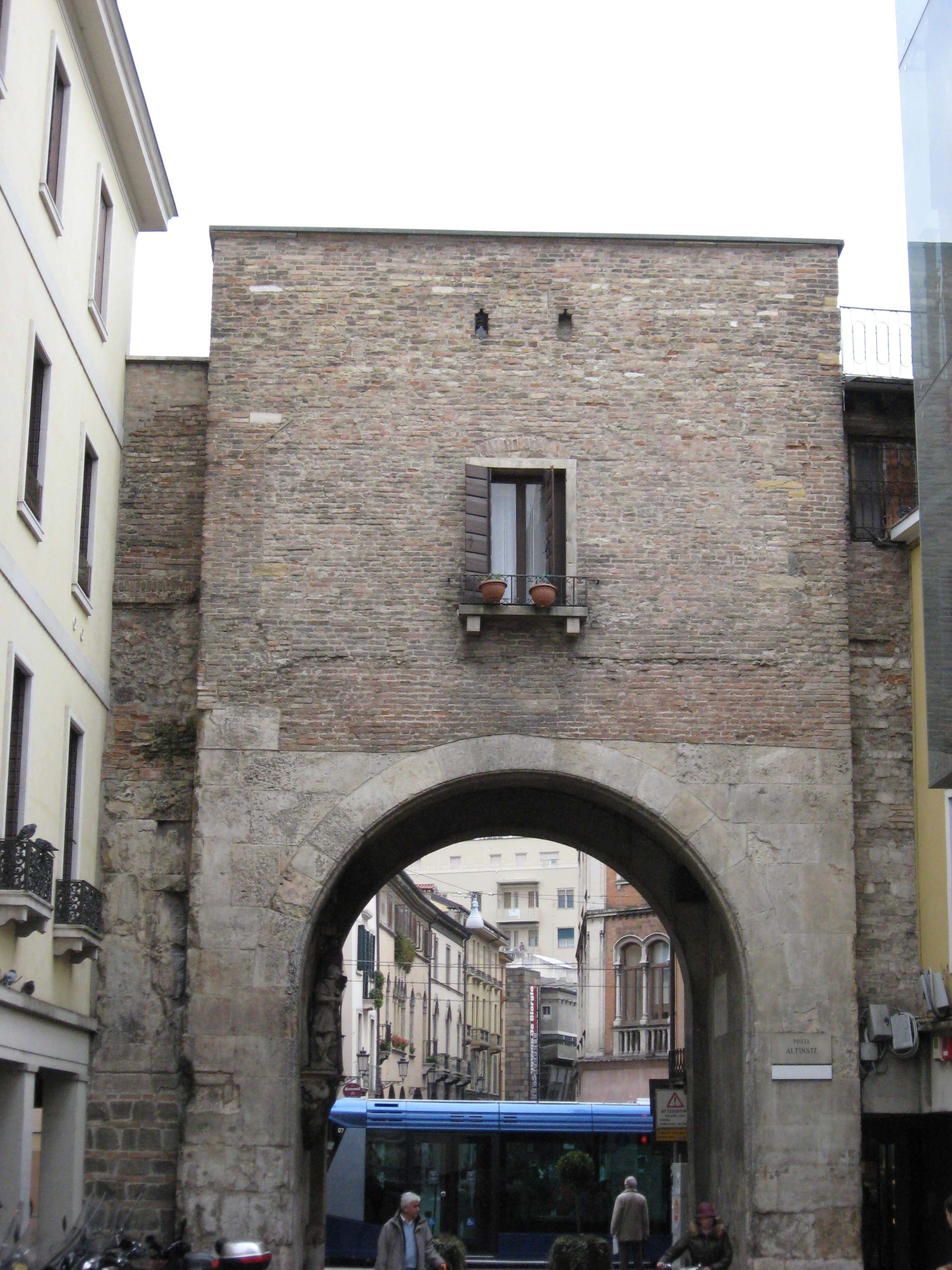 Porta Altinate